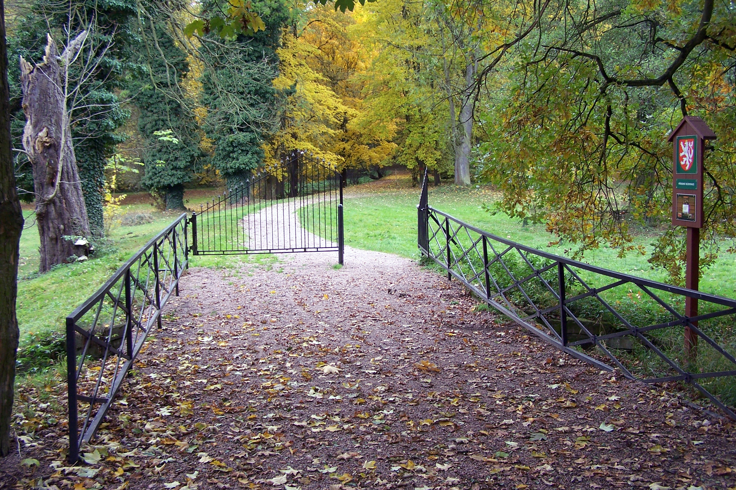 Choltická obora